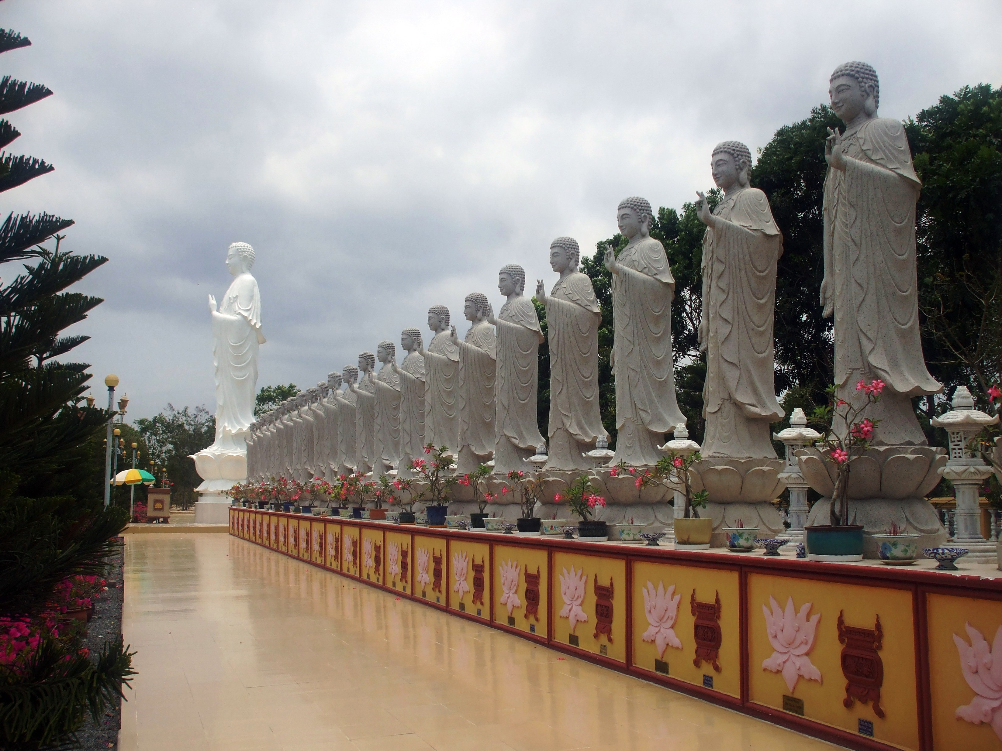 Vườn tượng Phật A-di-đà trong khuôn viên Vạn Phật Quang Đại Tòng Lâm Tự ở Bà Rịa-VũngTàu (Việt Nam).